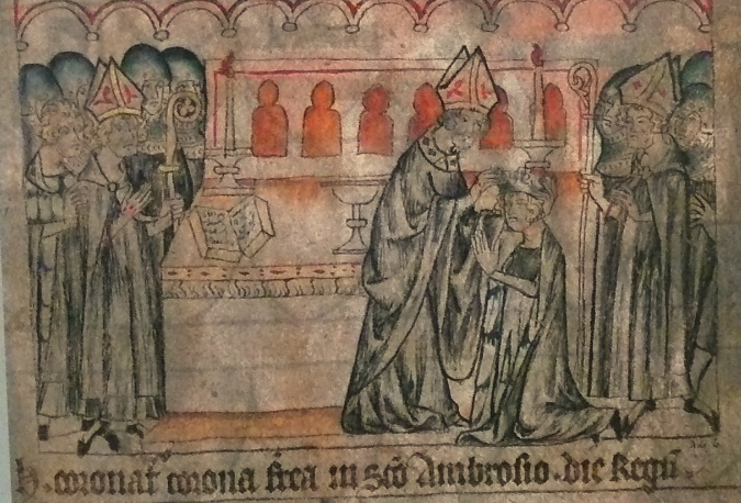 JIndřichova korunovace lombardskou korunou (1311)